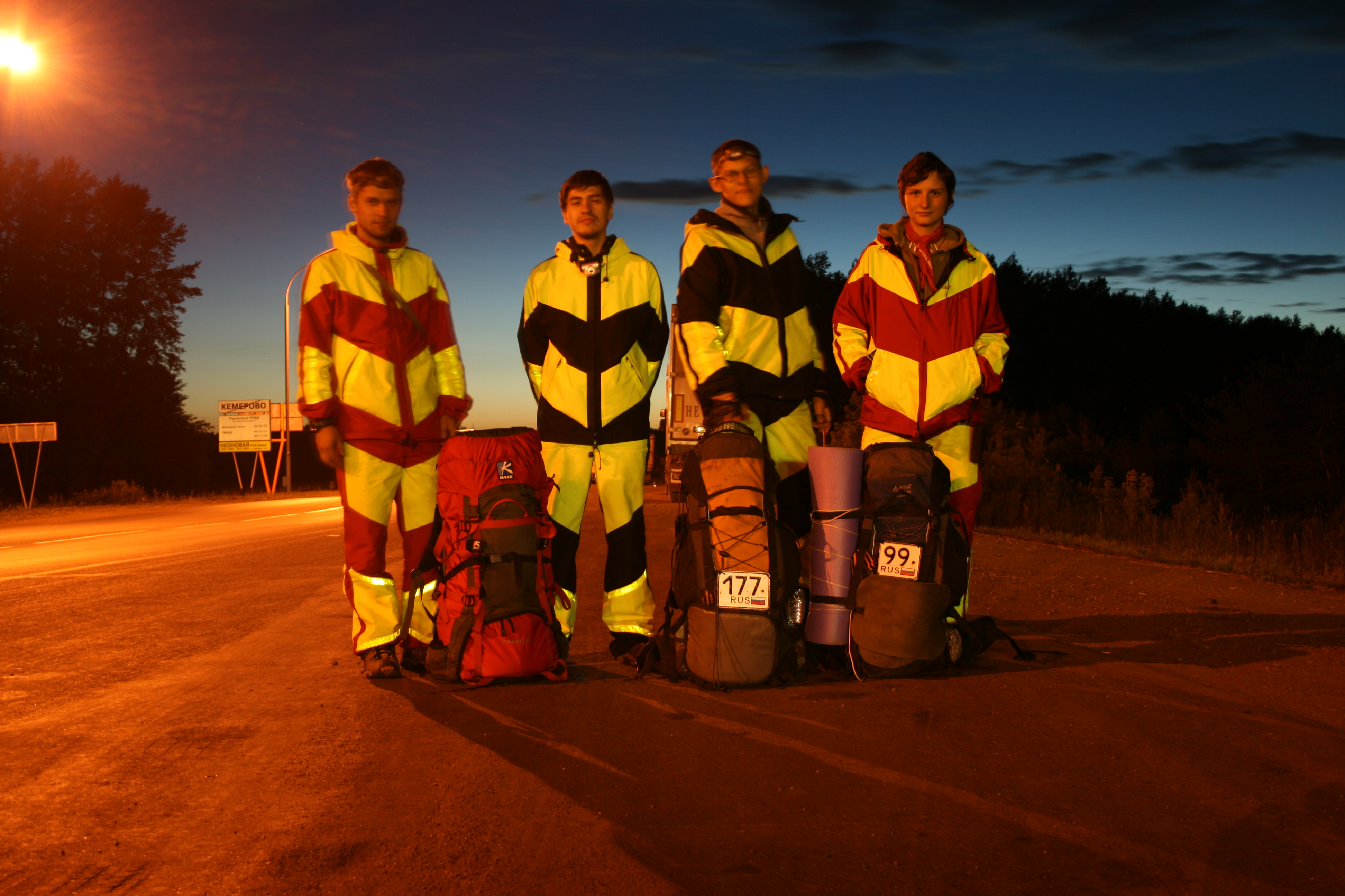 встреча команды автостопщиков под Кемерово ночью.